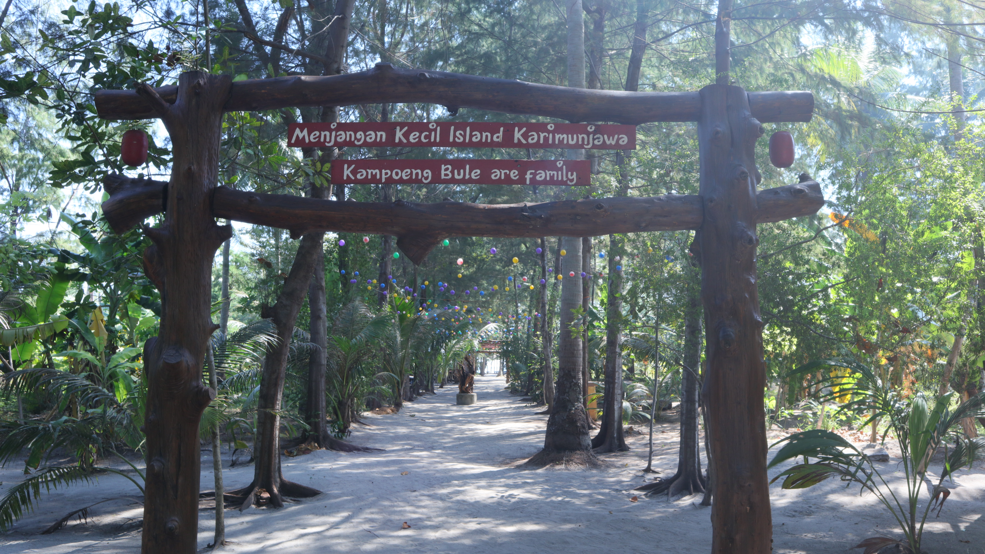 Gerbang menuju Kampung Bule di Menjangan Kecil